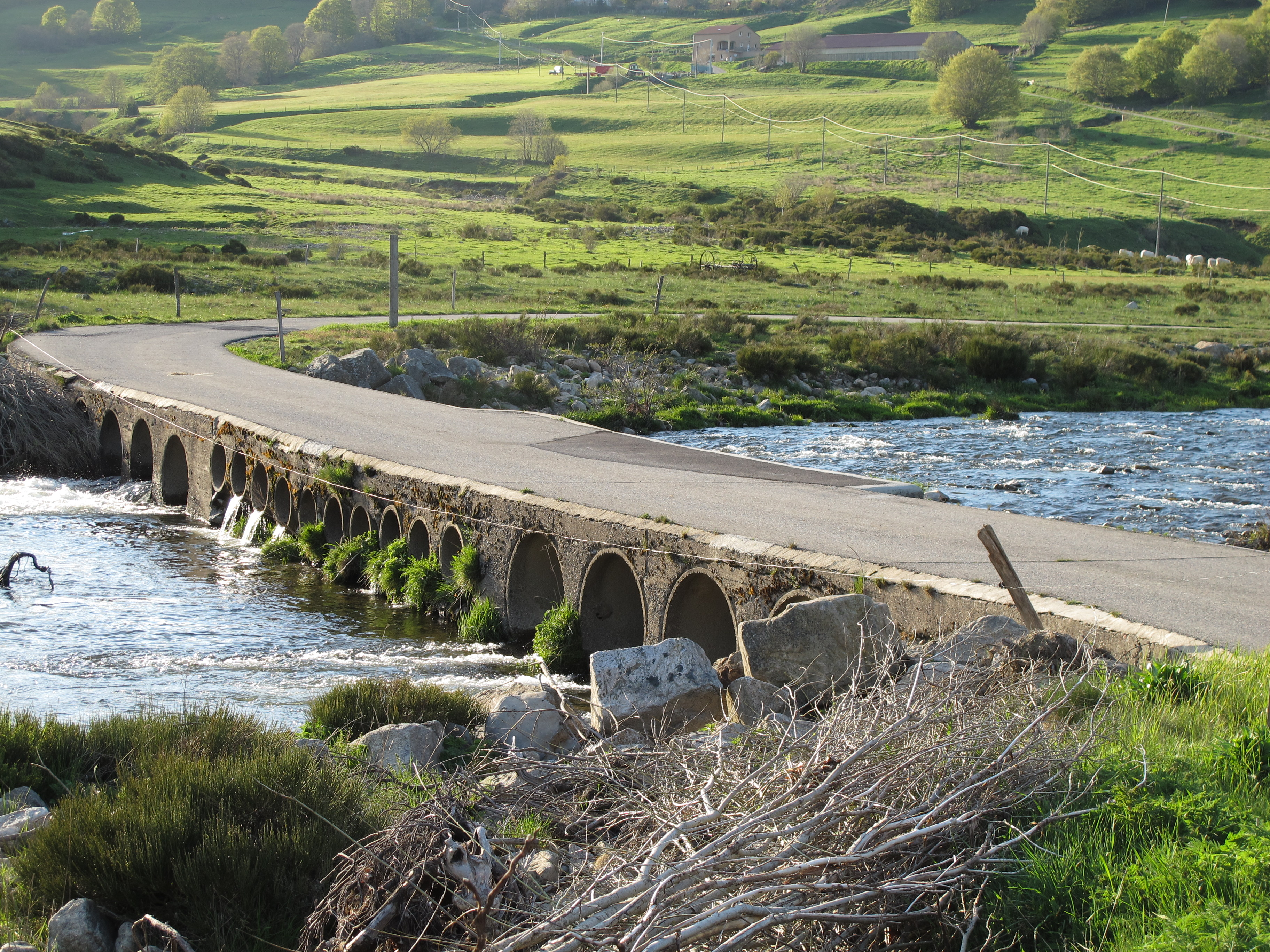 Pont sur la Loire à Usclades-et-Rieutord.